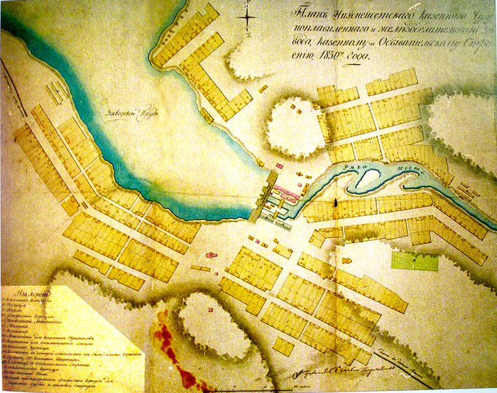 Исторический план Нижне-Исетского завода (Екатеринбург), 1830 год.